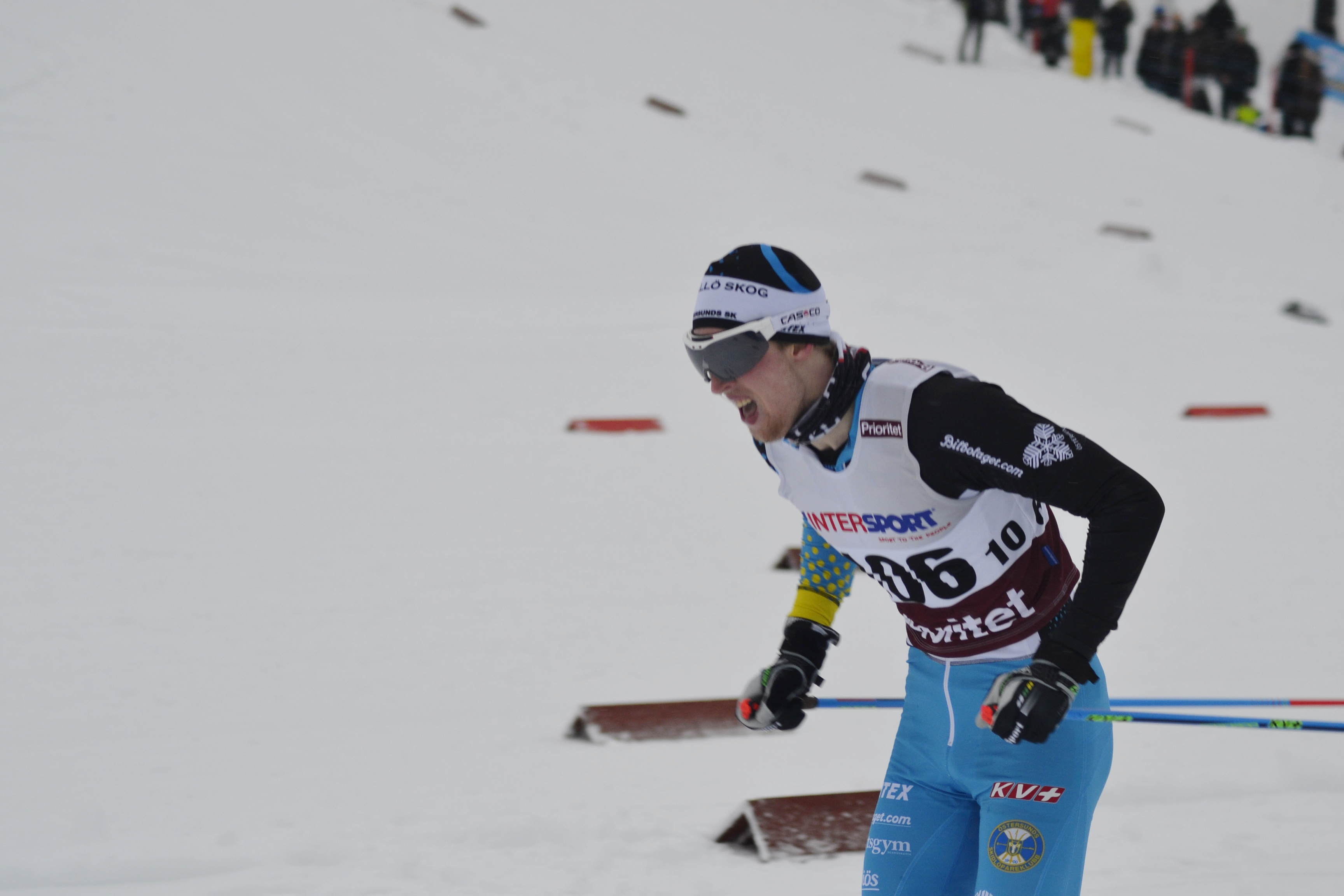 Carl Qvicklund i sprinttävlingen i samband med SM i Örebro/Ånnaboda 2015.